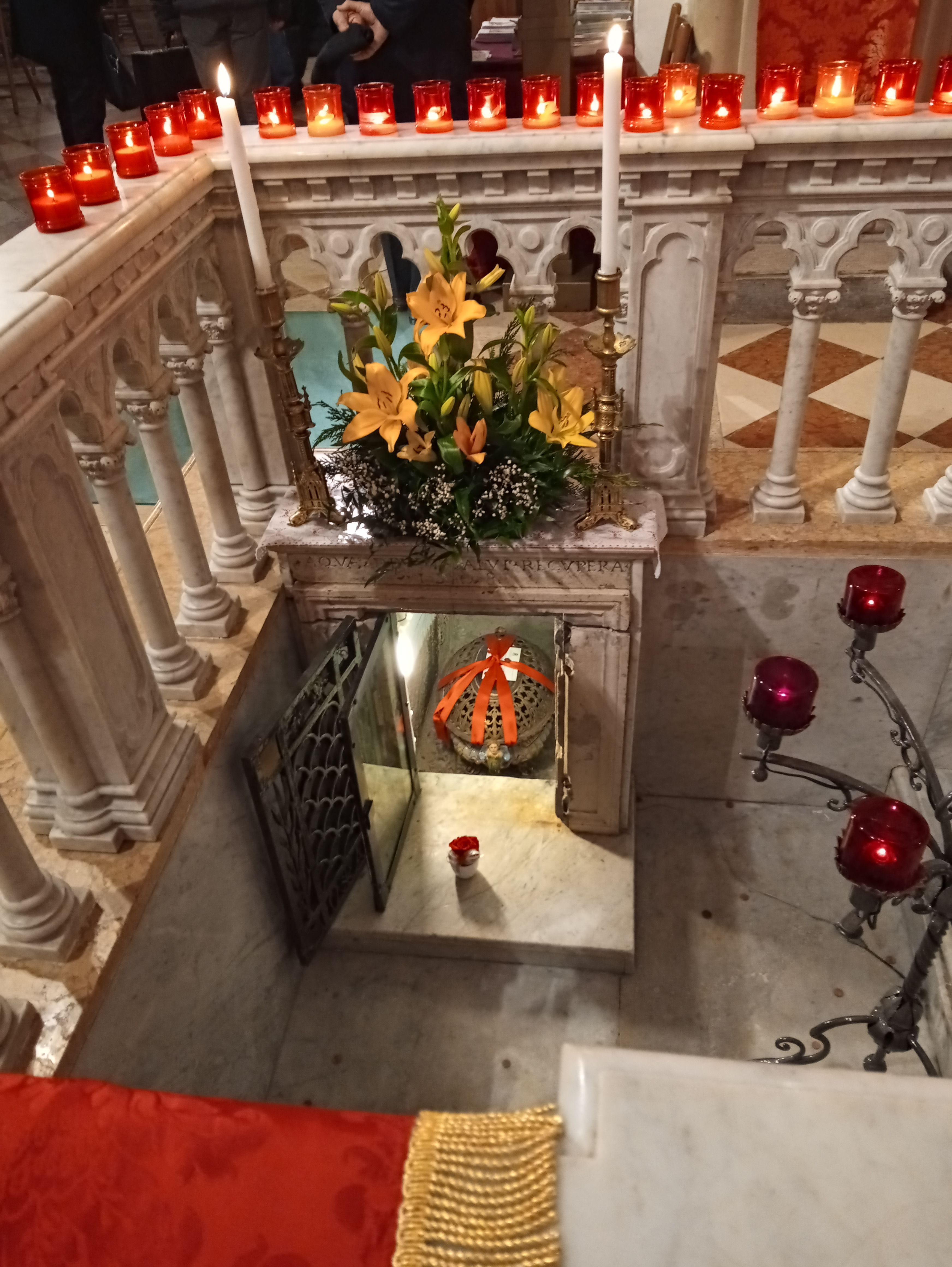 All'interno dell'urna sono conservate le ossa dei settantadue martiri che vennero uccisi a Concordia Sagittaria nel 304 d.C. durante le persecuzioni.